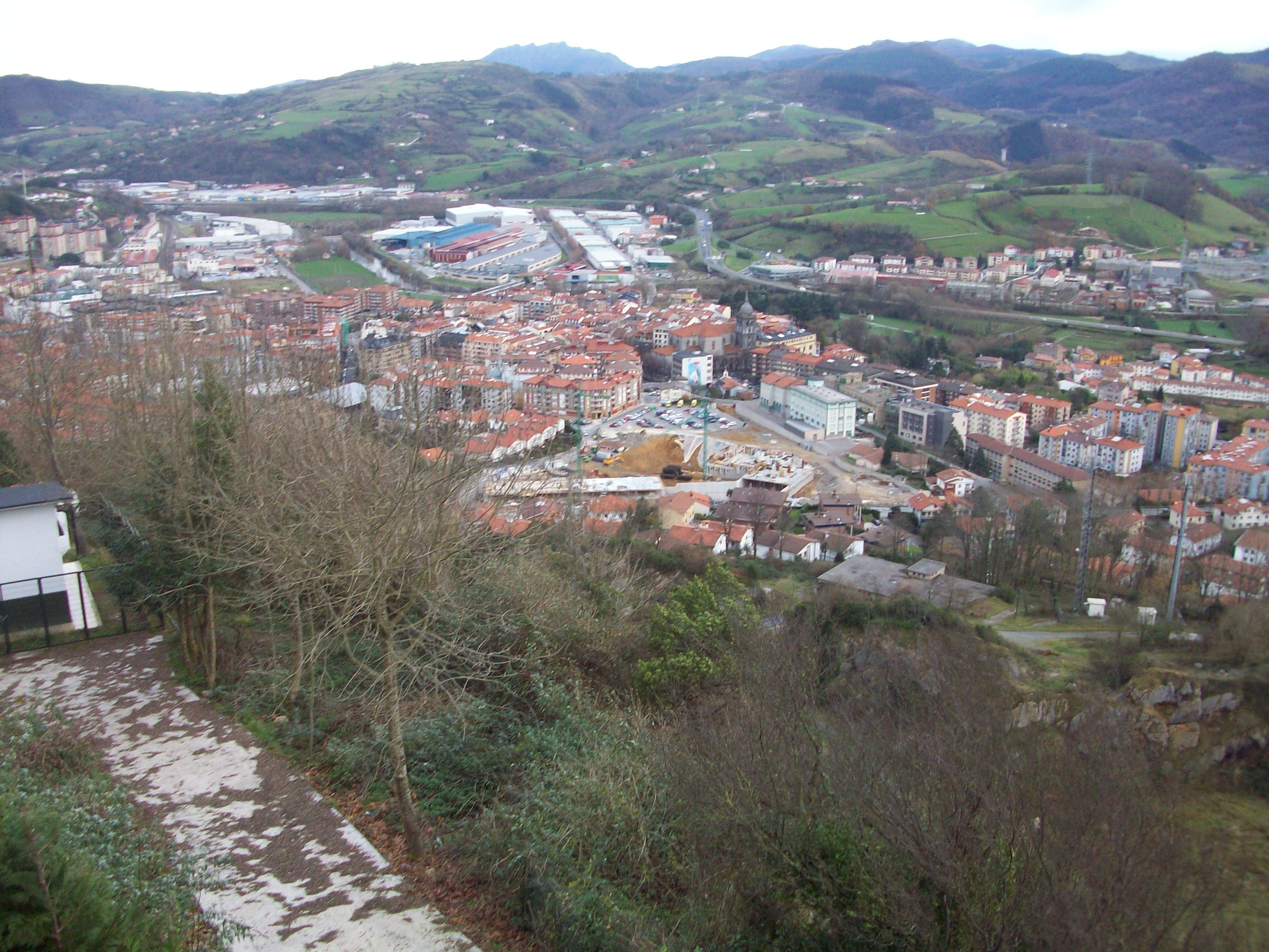 Hernaniko udalerria Santa Barbara gotorlekutik ikusita. Gipuzkoa, Euskal Herria.